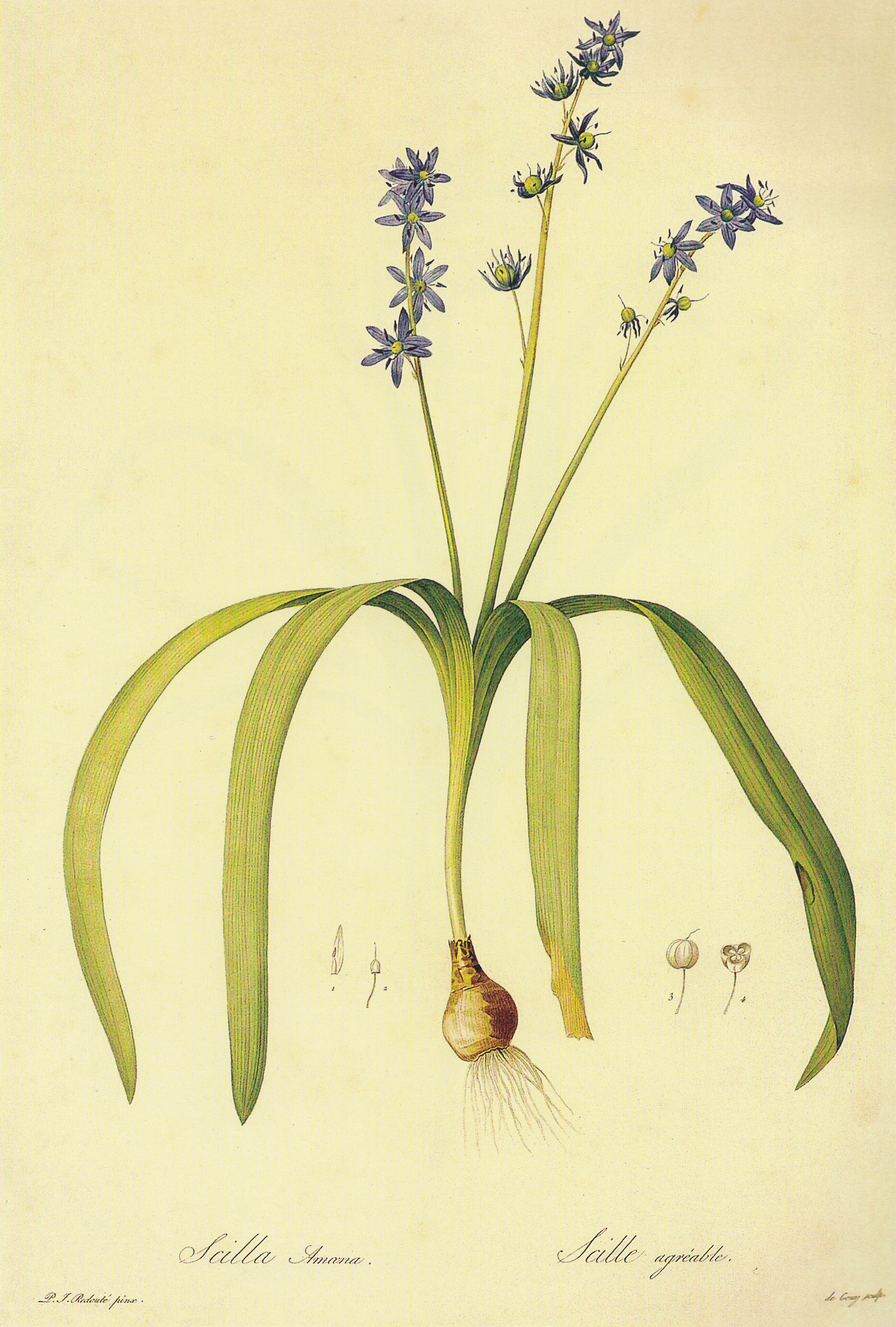 拜占庭绵枣儿。原产于亚洲。